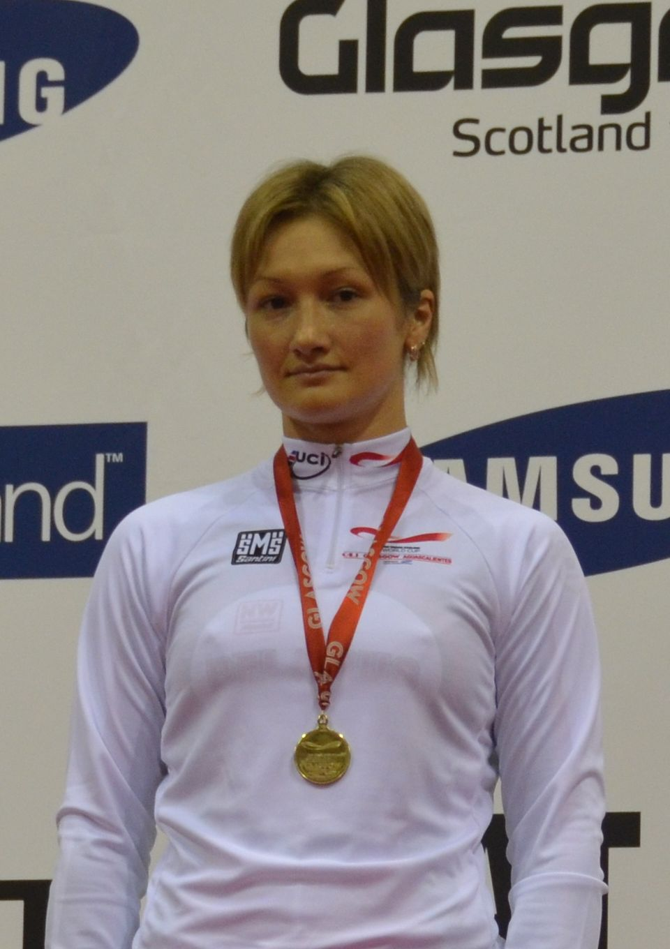 Olga Panarina, weißrussische Radsportlerin